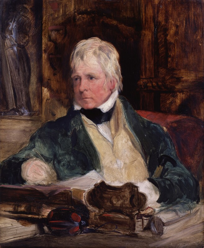 Sir Walter Scott, oil on panel, circa 1824